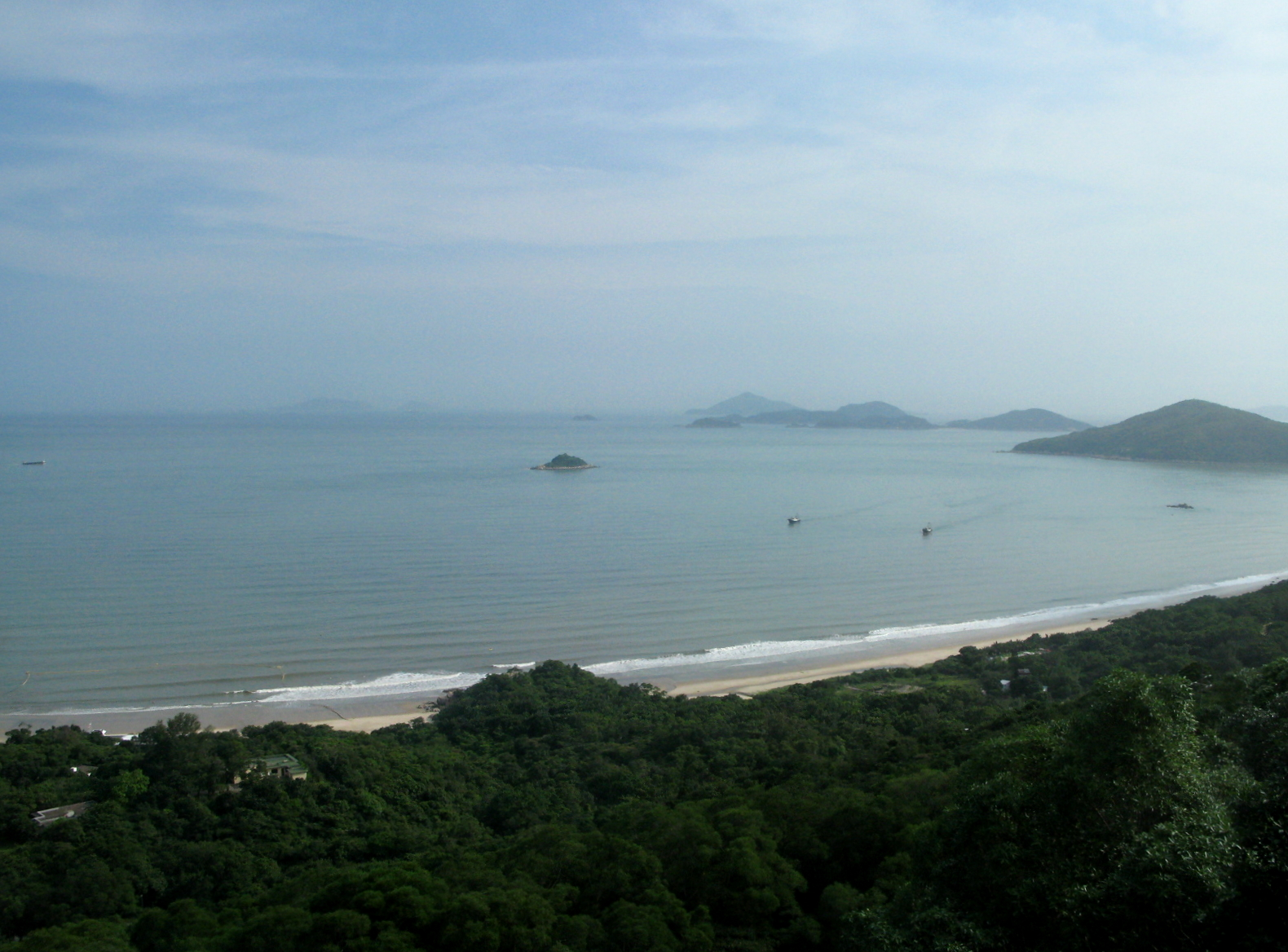 Cheung Sha, Lantau Island 長沙 (香港)